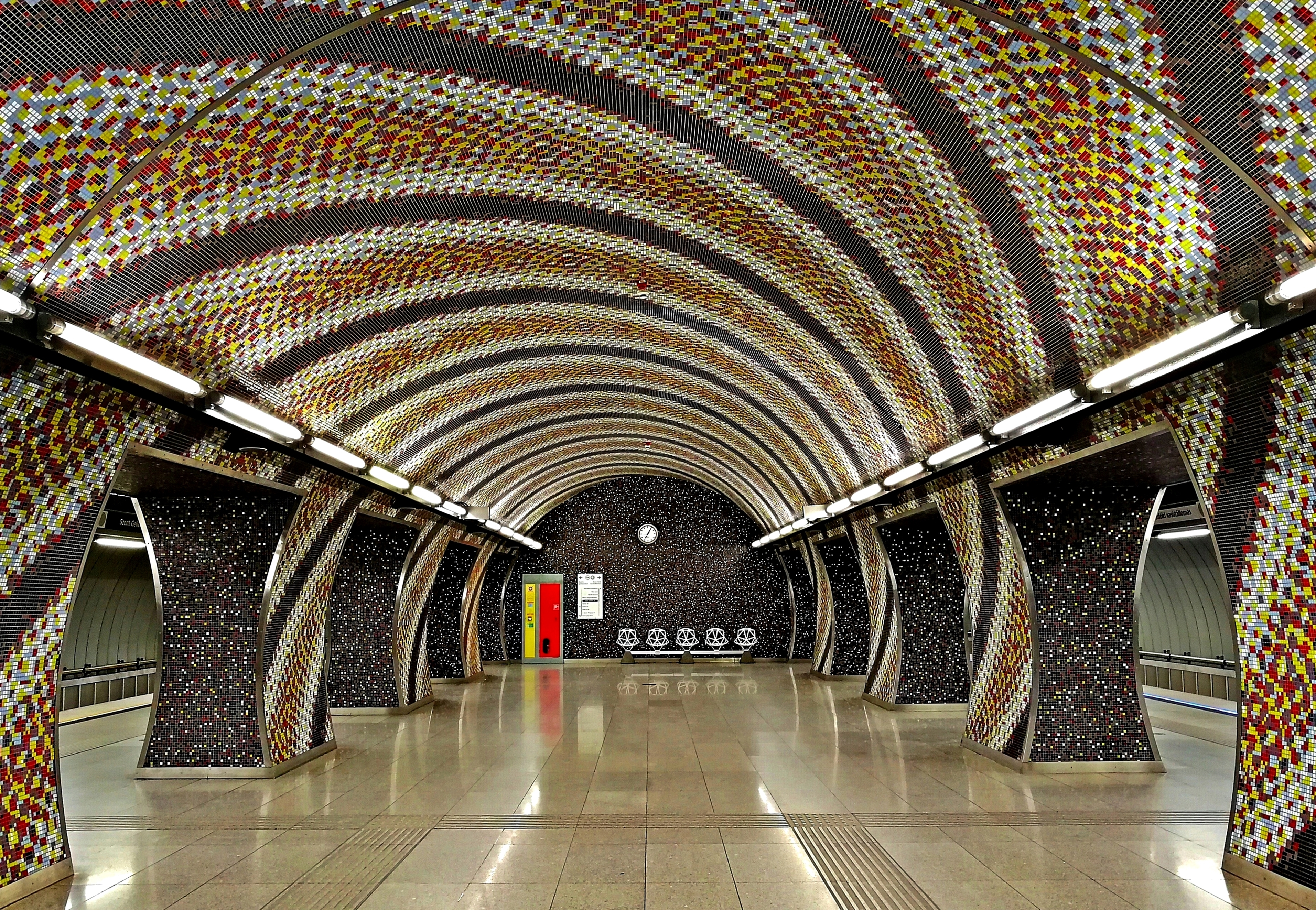 A 4-es metró Szent Gellért téri megállója